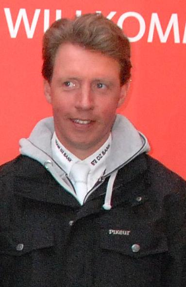 Markus Beerbaum beim Maimarktturnier 2010